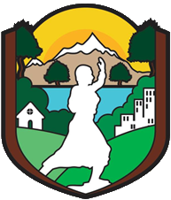 Distrito de Tamburco, Abancay, Apurímac